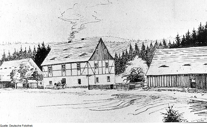 Original image description from the Deutsche FotothekBad Schandau-Krippen. Königsmühle mit Schneidemühle (1894 abgebrochen), Zeichnung nach einer Fotografie, aus: Meiche 1927